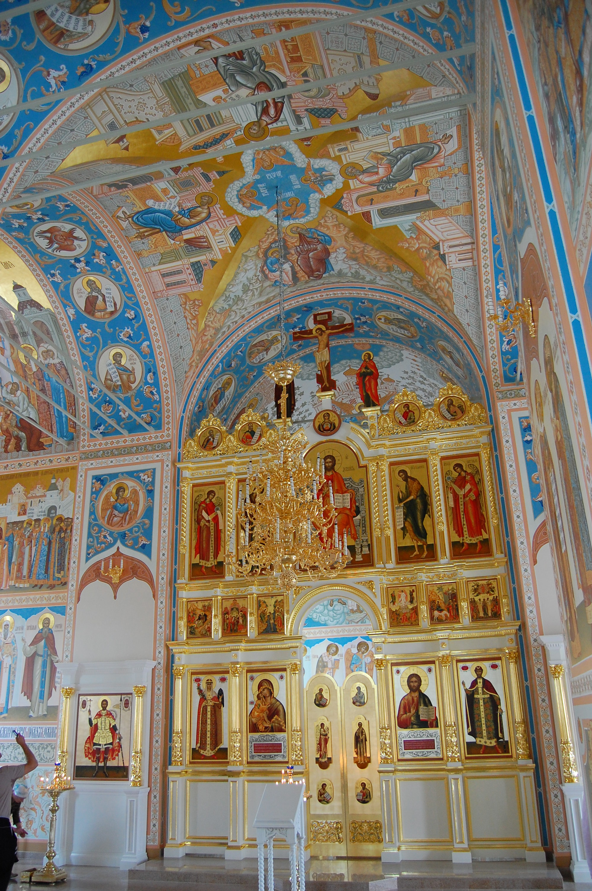 Успенский собор Тульского кремля, интерьер храма в честь Дмитрия Донского на первом ярусе колокольни, центральная часть и алтарь